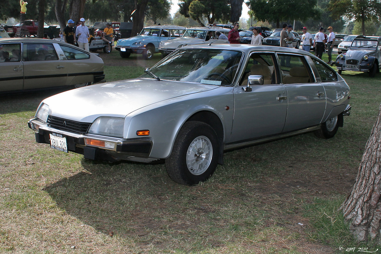 1982 Citroen CX Prestige - silver - fvr